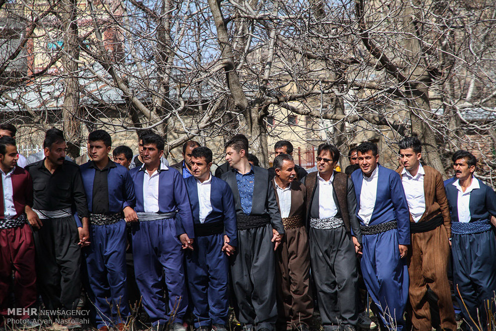 جشن نوروز به عنوان یکی از آیین های قدیمی در روزهای نخستین سال در مناطق شهری و روستایی استان کردستان با حضور و استقبال پرشور مردم برگزار می شود. در این آیین سنتی مردم هر روستا با جمع شدن در یک مکان مشخص ضمن روشن کردن آتش با رقص محلی و خواندن آواز فرا رسیدن سال نو را جشن میگیرند. مراسم نوروز روستای بیساران به عنوان یکی از پرجمعیت ترین و بزرگ ترین روستاهای کشور با حضور مردم روستا و شماری از هنرمندان کردستانی برگزار شد.